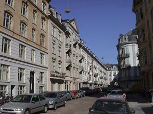 Westend, 1661 Vesterbro, København. Foto af Lars Bregendahl Bro.